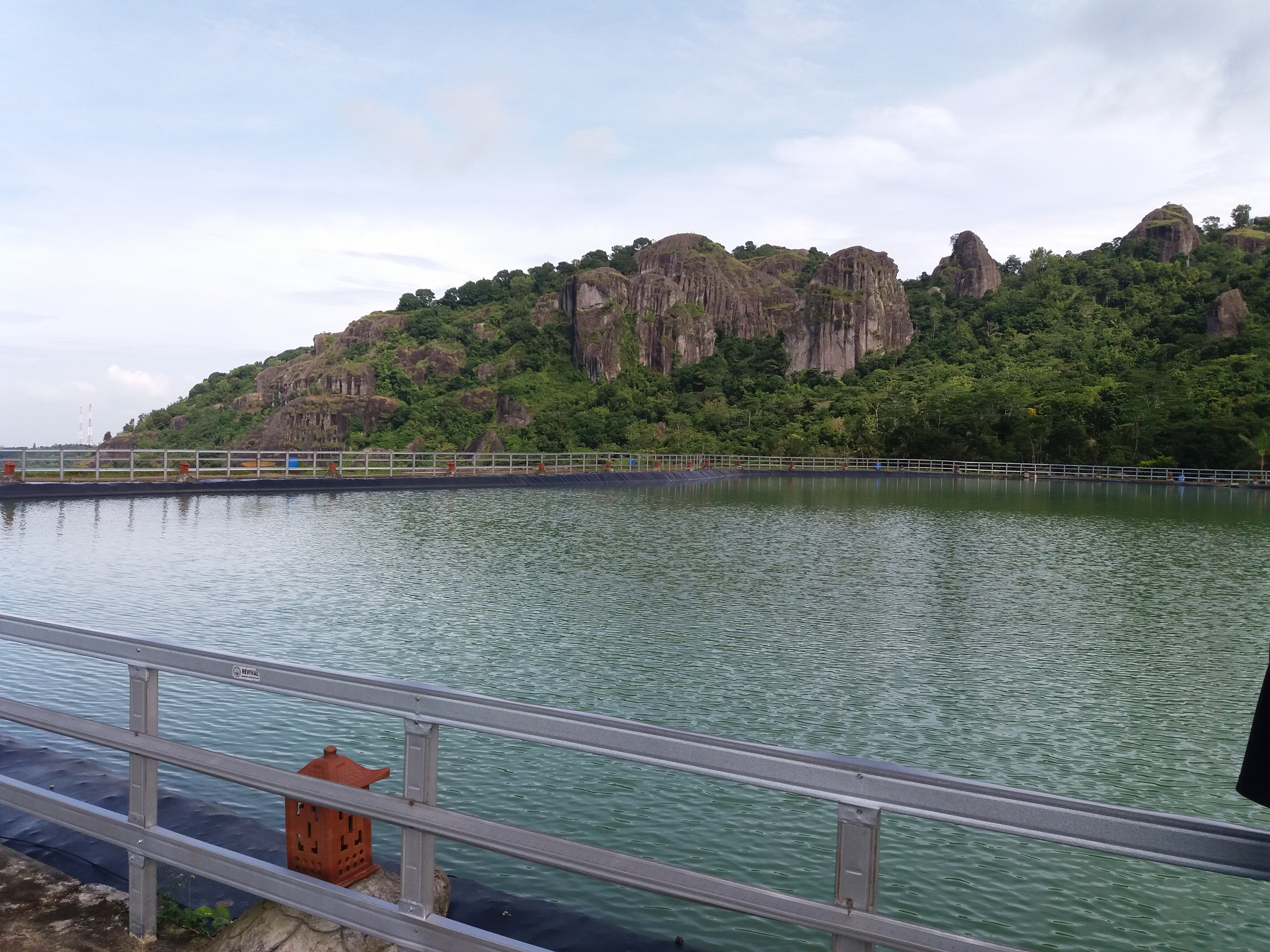 Pemandangan gunung api purba nglanggeran